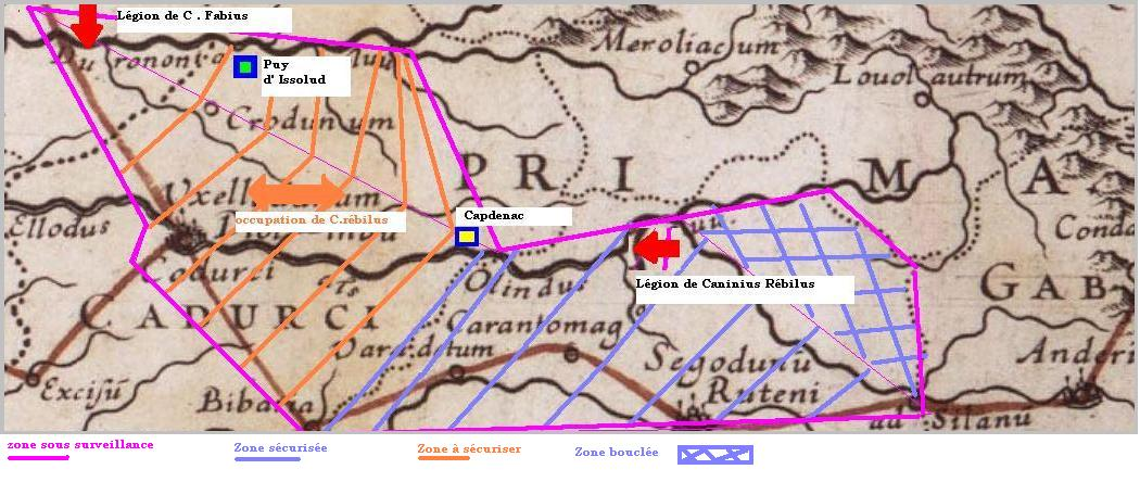 occupation de la région Cadurque et Rutène par Caninius rébilus Licensing Catégorie:Cartes Histoire de France